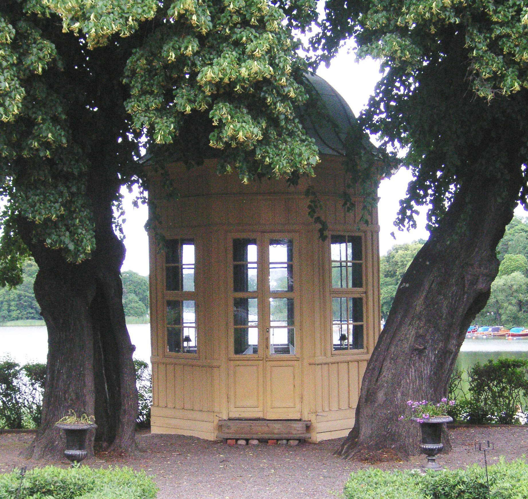 Drottning Kristinas lusthus på Stallmästaregården, Stockholm (1600-tal)